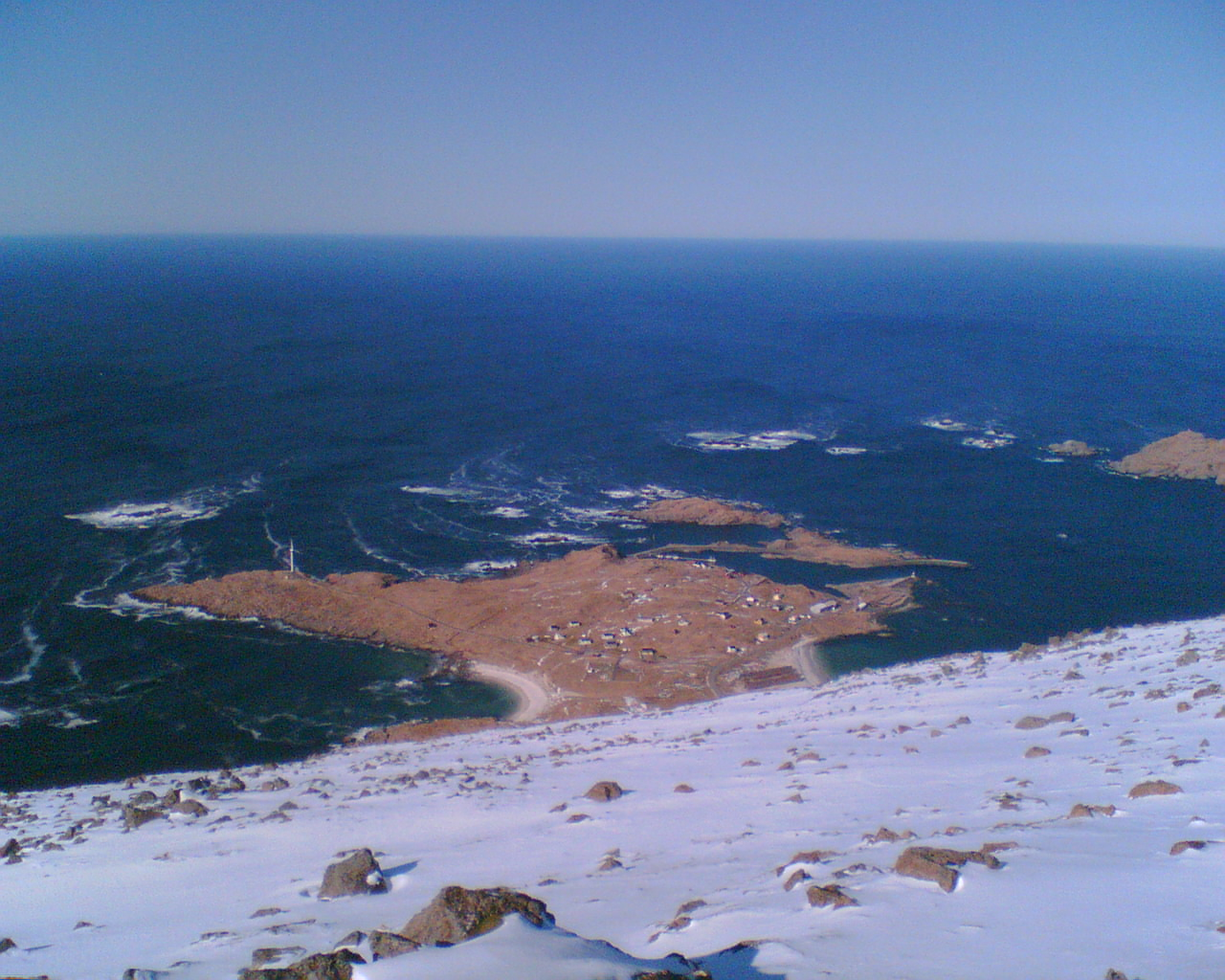 Vårbilde fra Vesterålen. Fiskeværet i mars 2006.